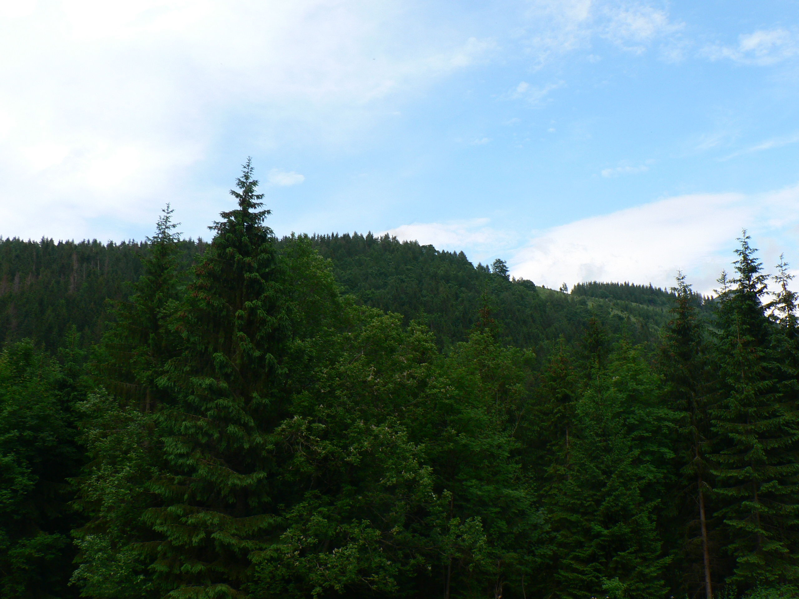 Grzbiet Rogowej z Jaworzyny Spiskiej